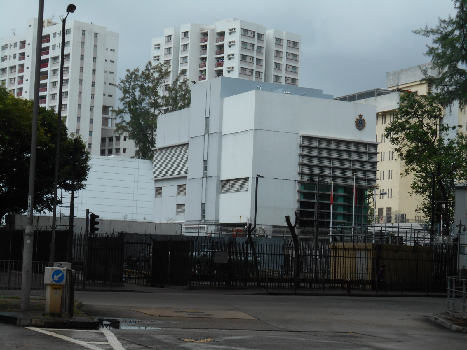 中文（香港）: 荔枝角收押所(2016年8月)